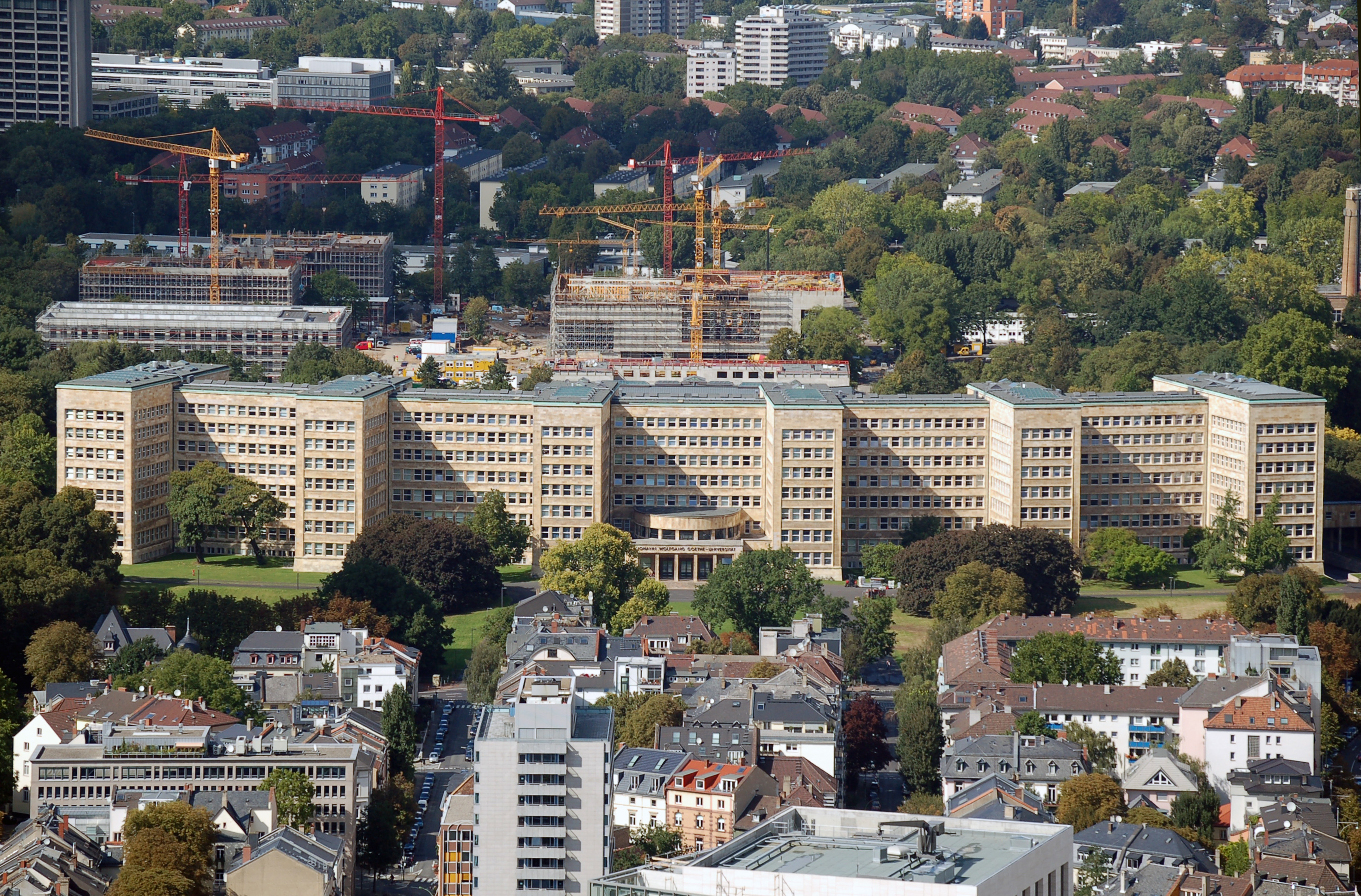 Poelzig-Bau (IG-Farben-Gebäude)